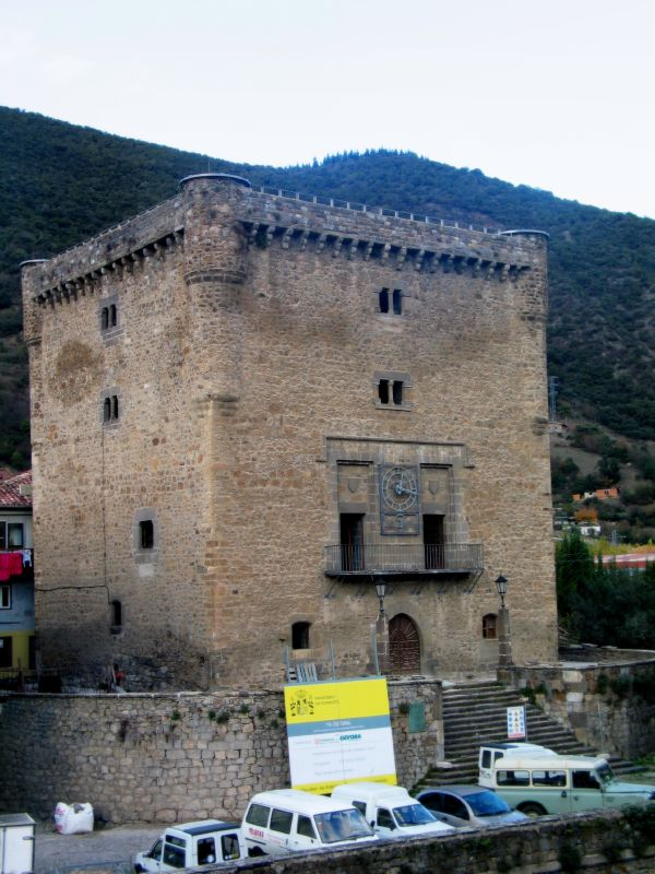 Torre del Infantado en Potes (Cantabria, España). Siglo XV